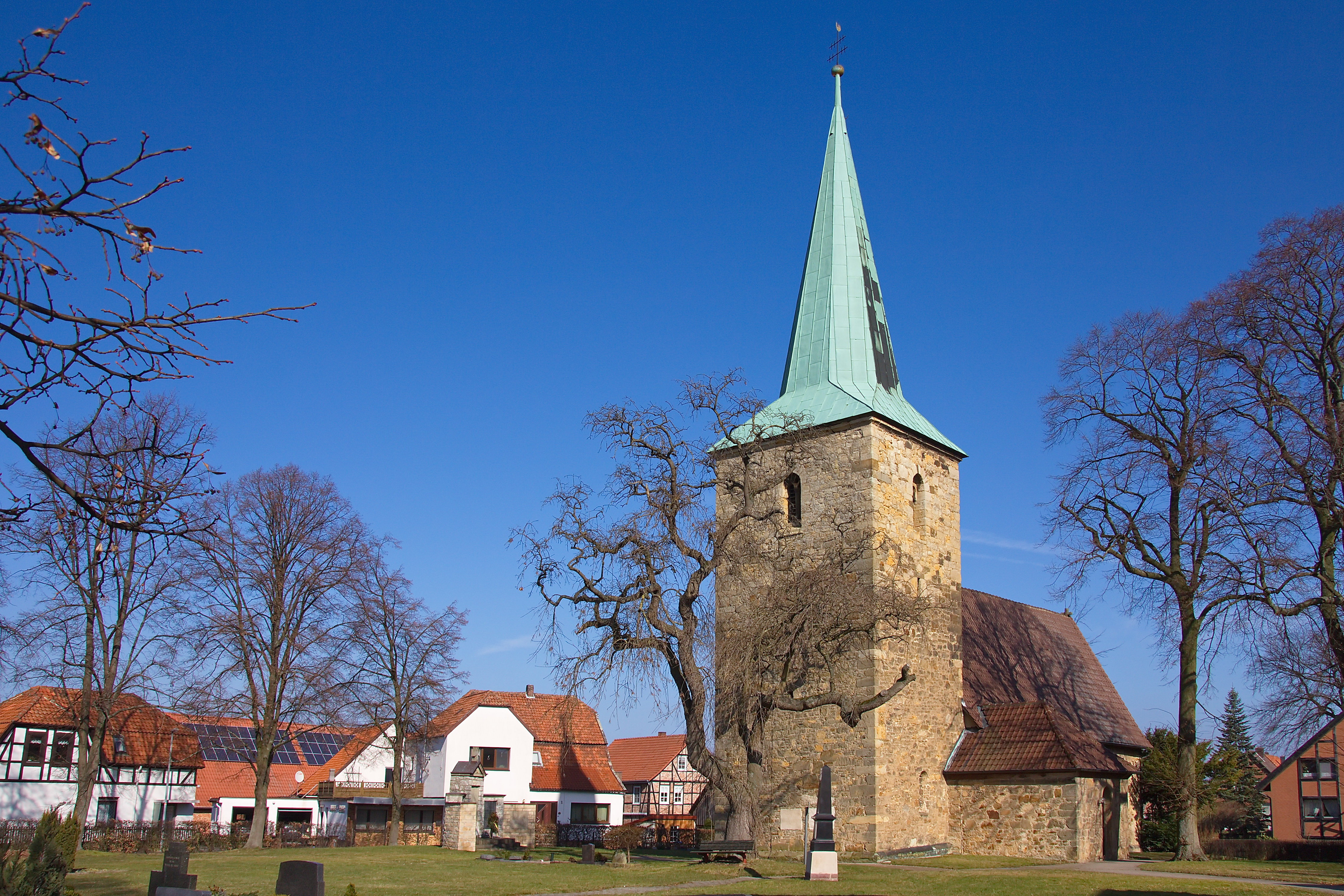 Cosmas und Damian-Kirche aus dem 15. Jhd. in Rautenberg (Harsum), Niedersachsen, Deutschland